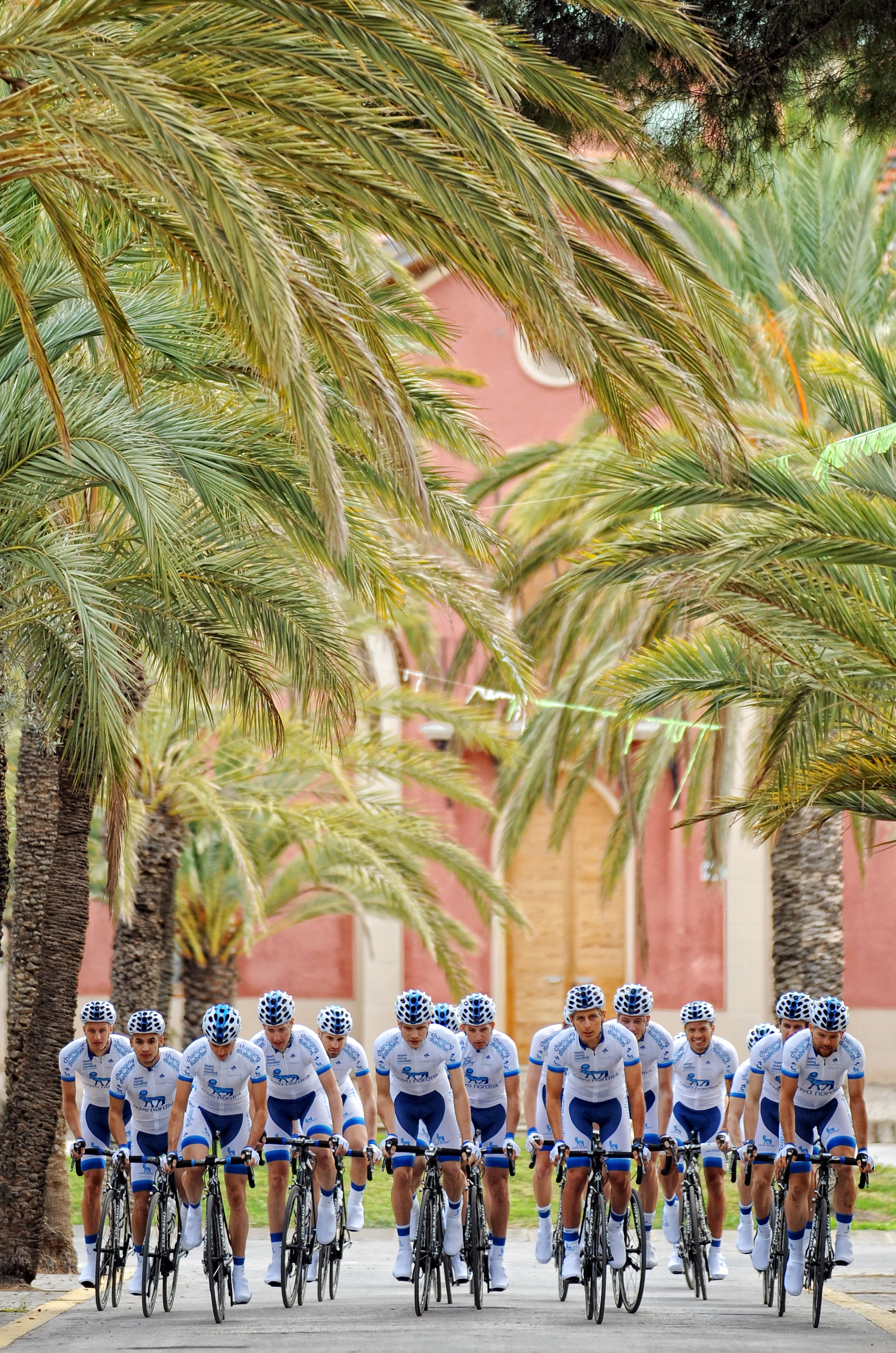 This is a photo of the 2016 Team Novo Nordisk roster.